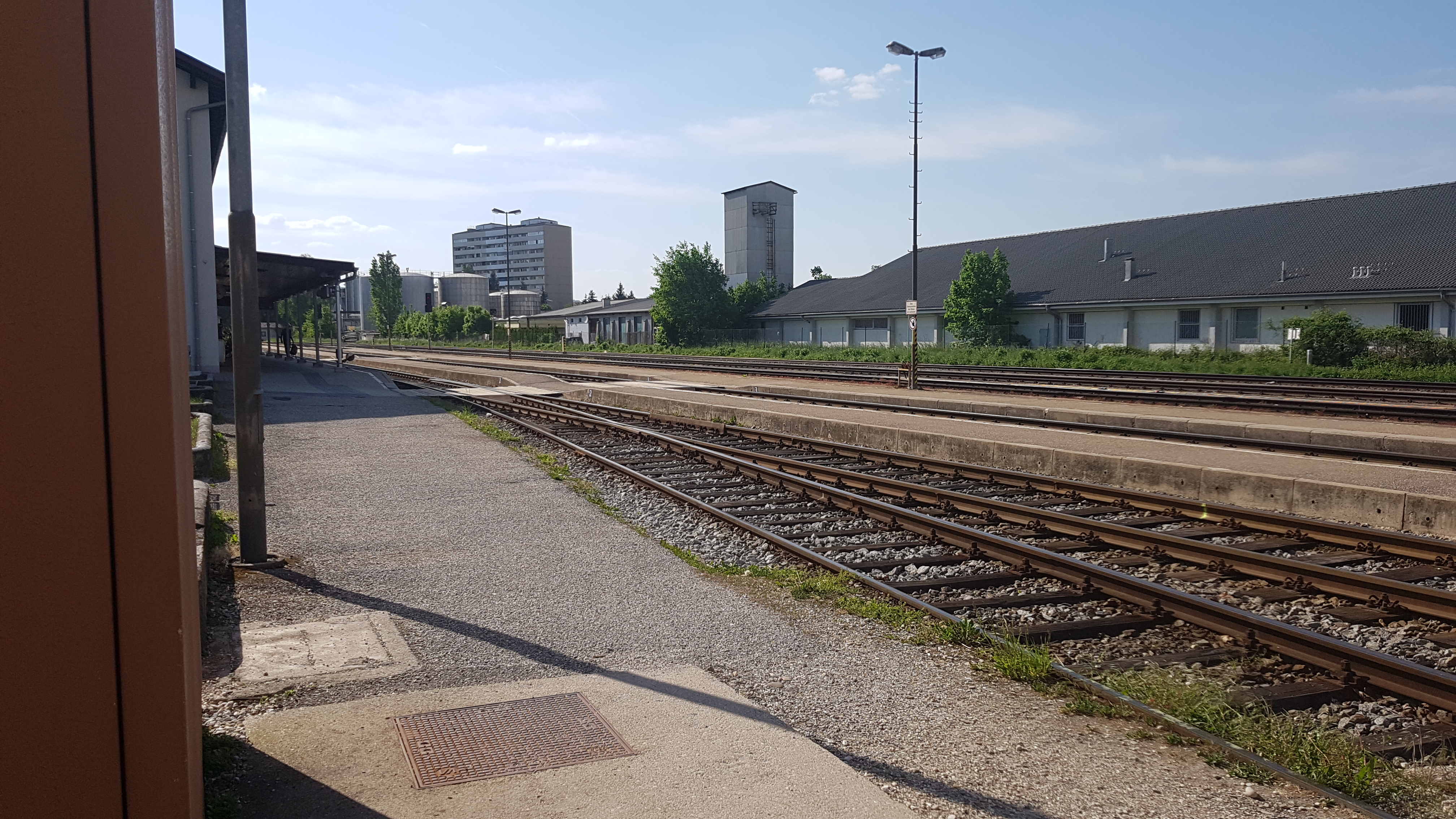 Blick auf die Bahnsteige am Bahnhof Braunau